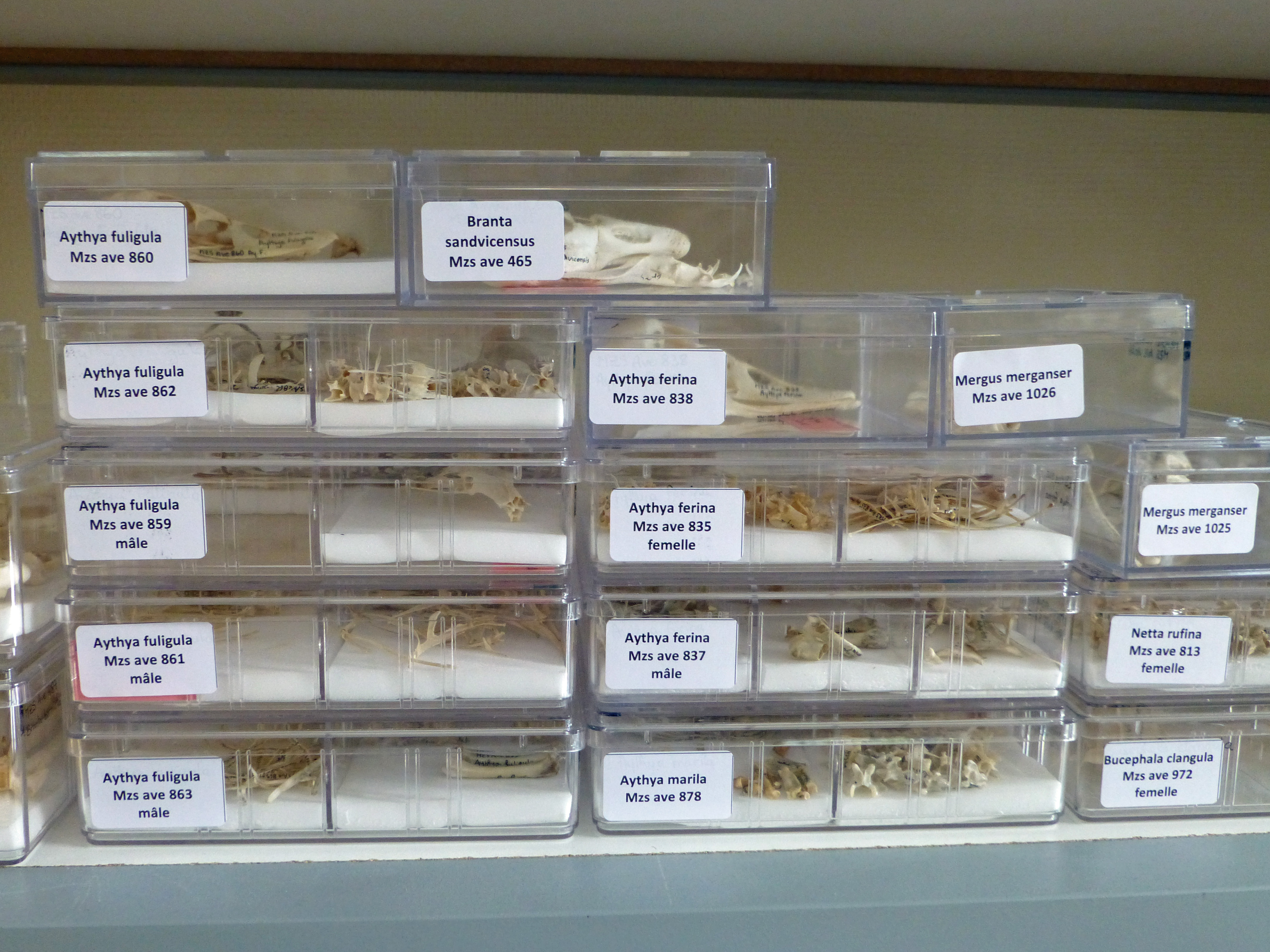 Ostéothèque de Strasbourg, constituée par Rose-Marie Arbogast, archéozoologue, opérationnelle depuis novembre 2009 au Musée zoologique de Strasbourg.